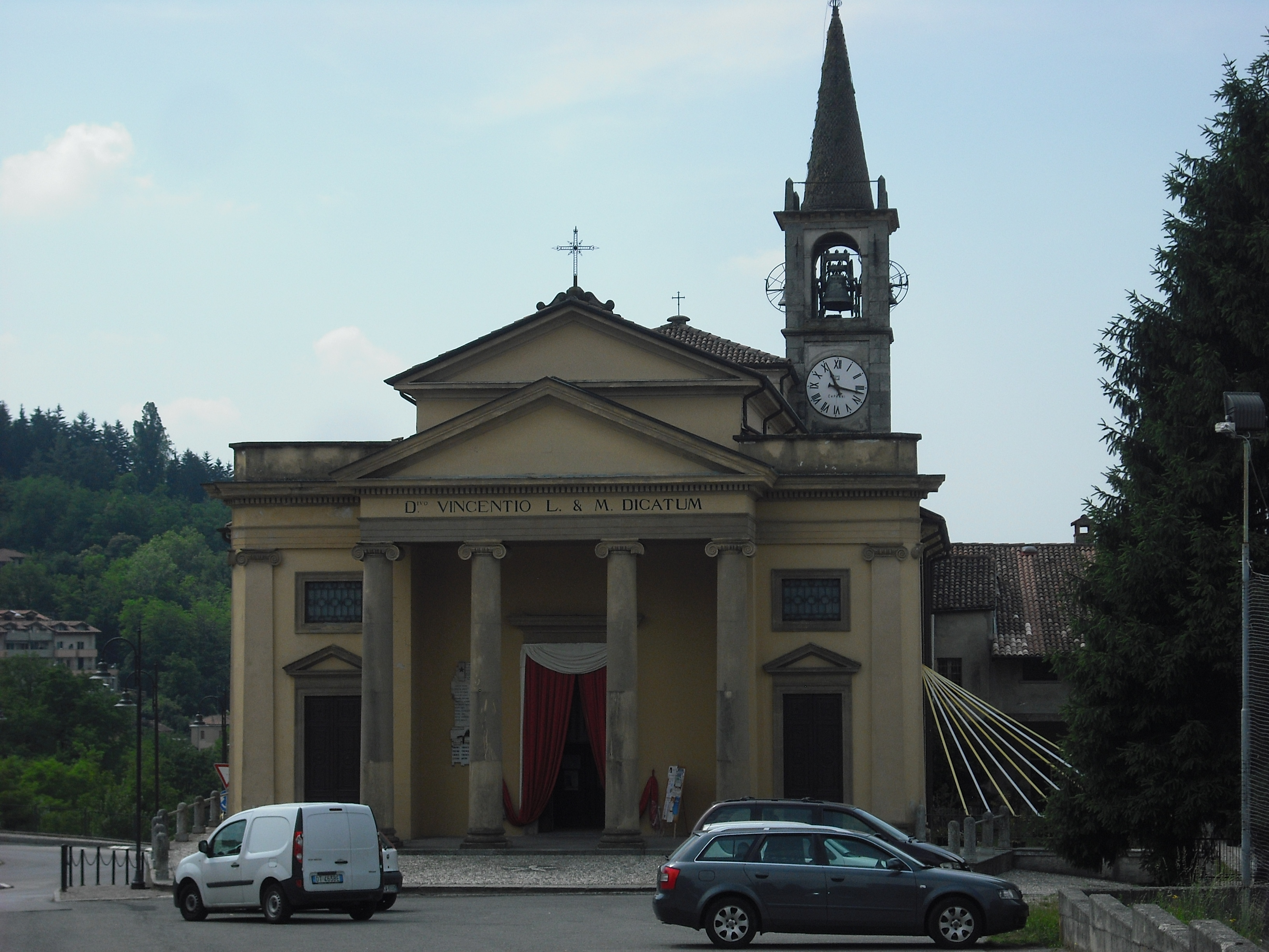 La chiesa parrocchiale di Viganò (Lc)